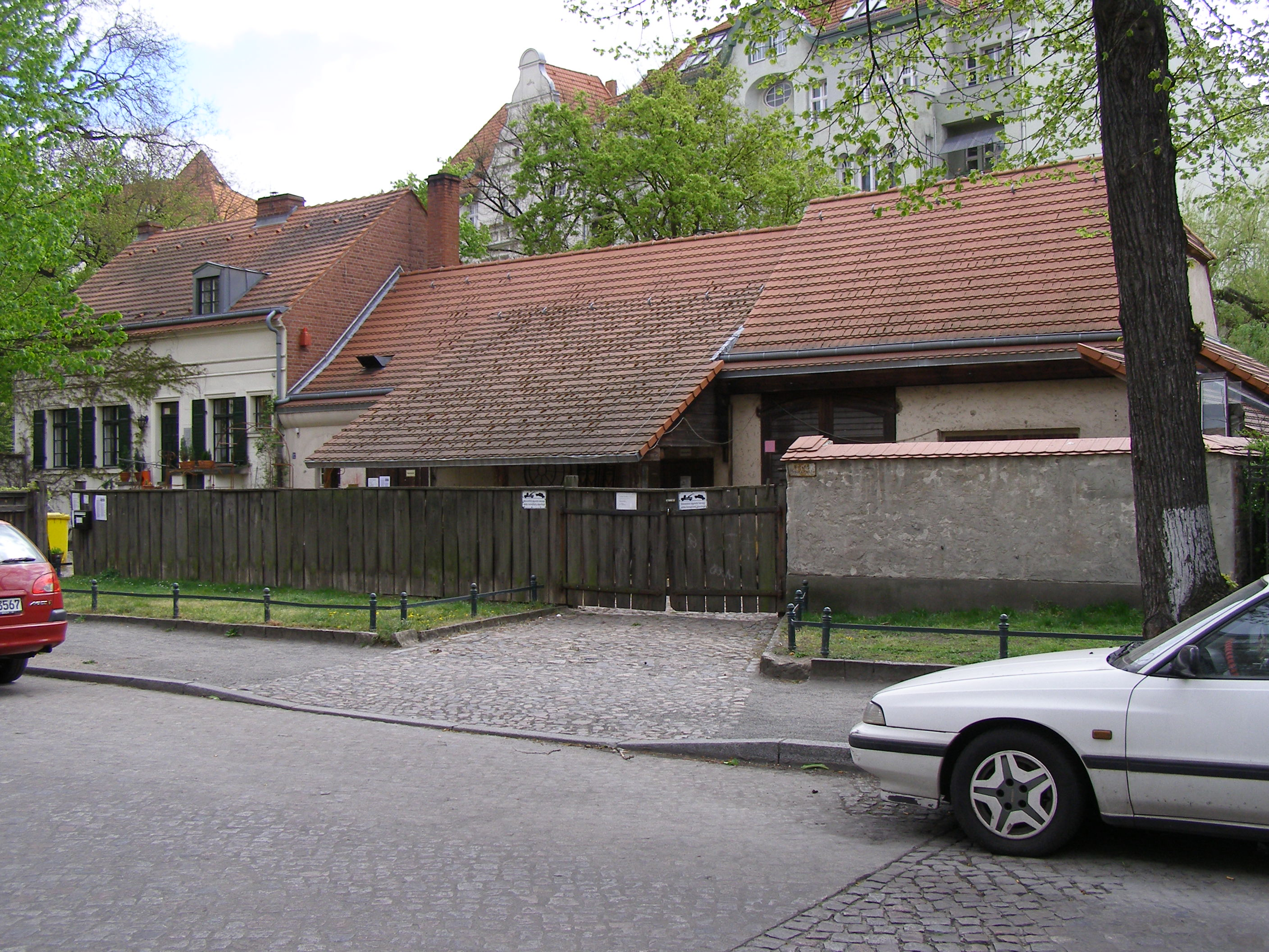 „Böhmisch-Rixdorf“ in Berlin, Rixdorfer Schmiede „Český Rixdorf“ v Berlíně, Rixdorfská kovárna „Bohemian Rixdorf“ in Berlin, Rixdorf smithy